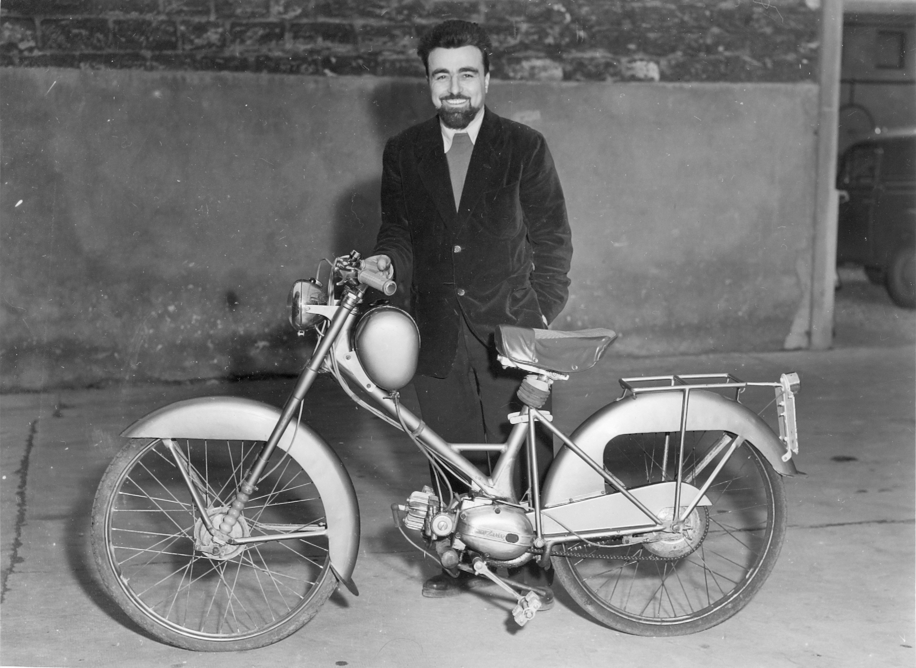 Vincent Piatti devant son minimotor 50cc